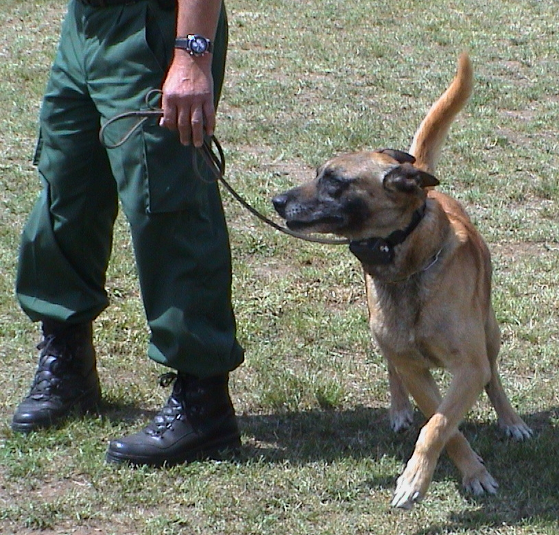 Diensthund der Bereitschaftspolizei Würzburg